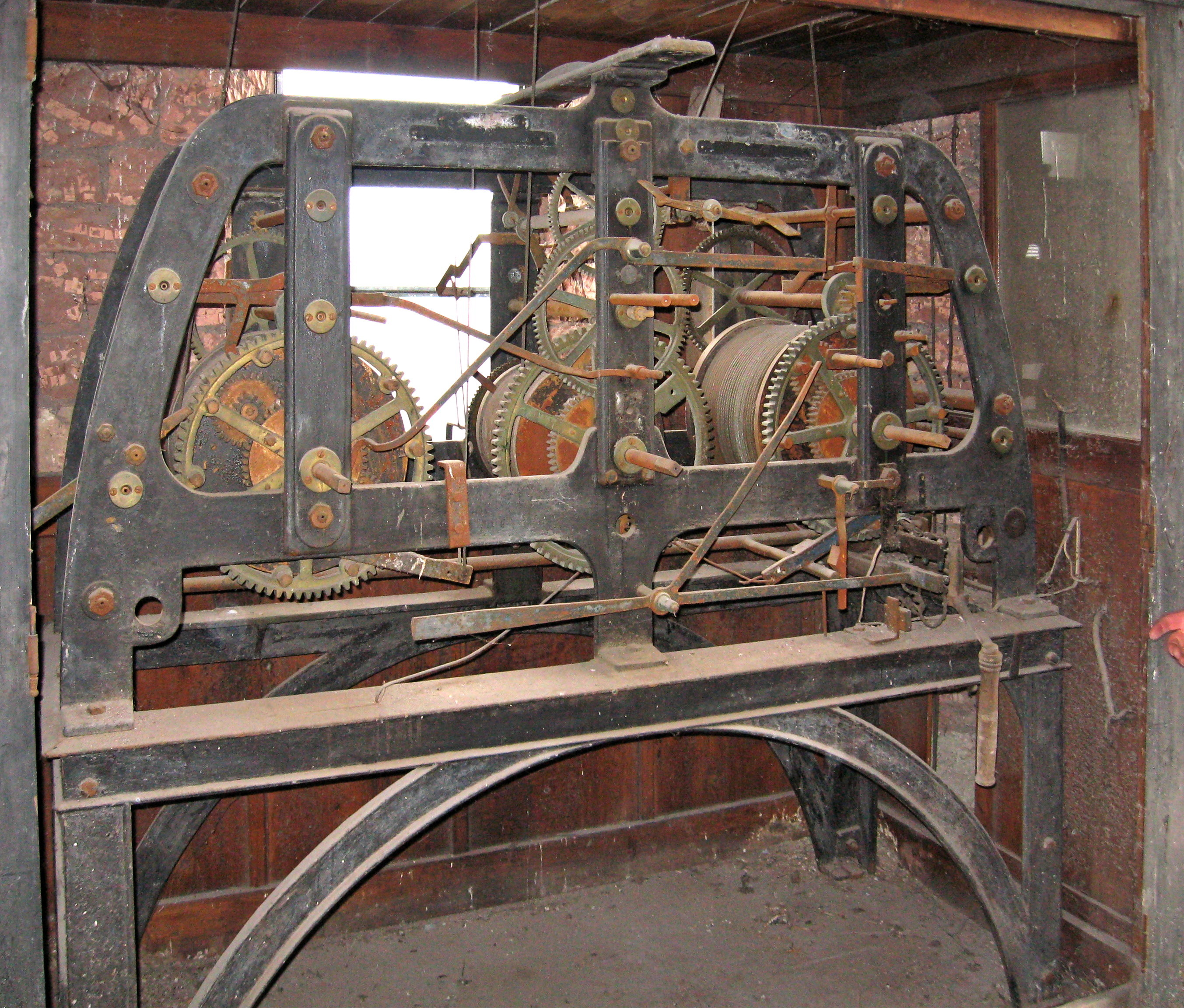 Uhrwerk im Saardom